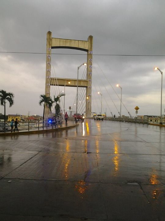 Puente Humberto Alvarado Prado